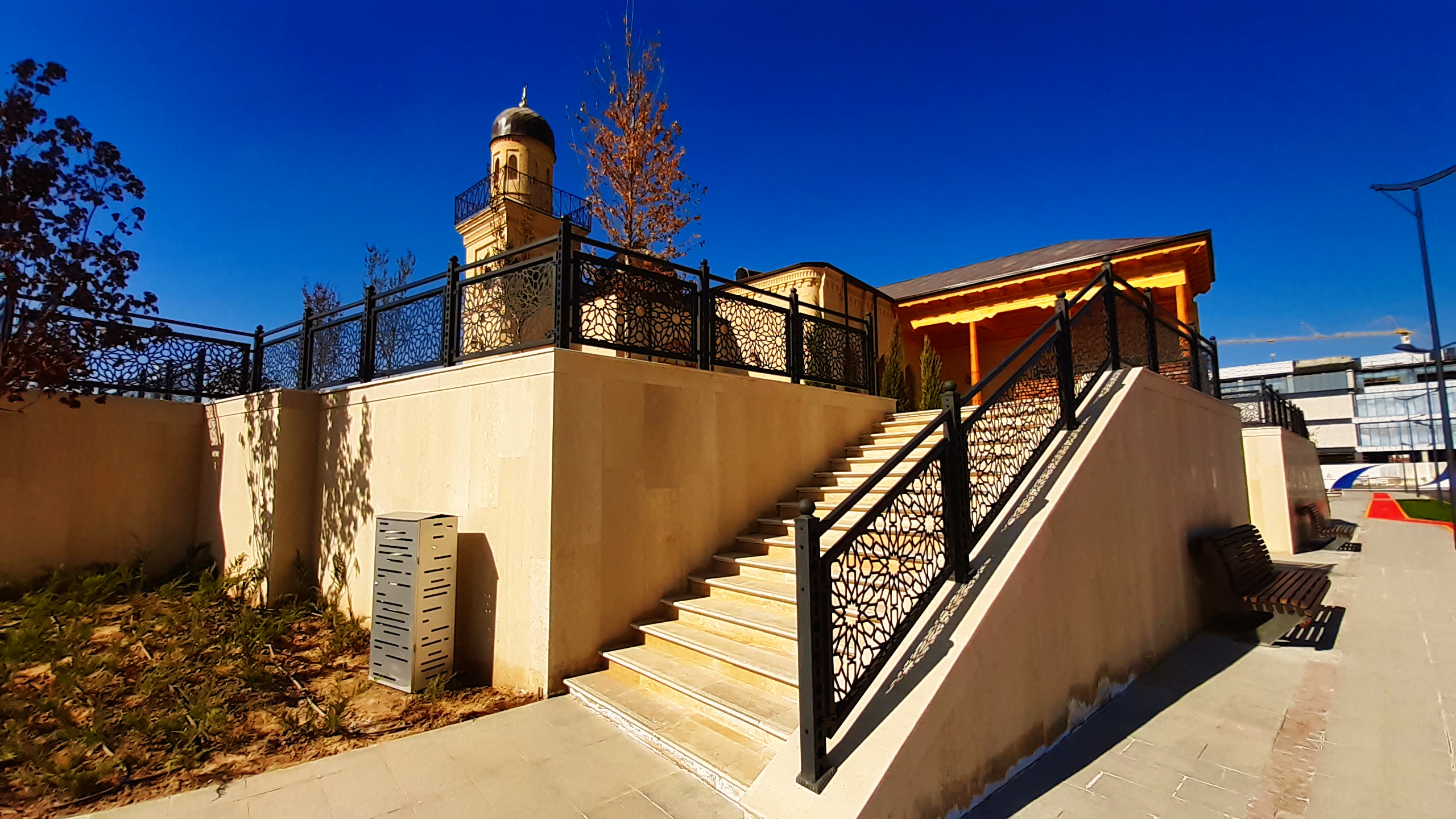 Мечеть Орифжонбой-ота после реставрации